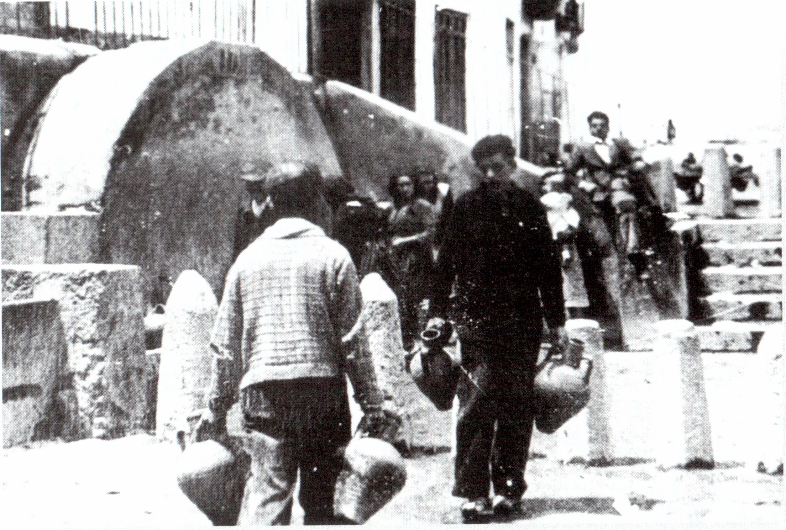 Vecinos de Puerto Lumbreras acudiendo a la Fuente del Caño para recoger agua